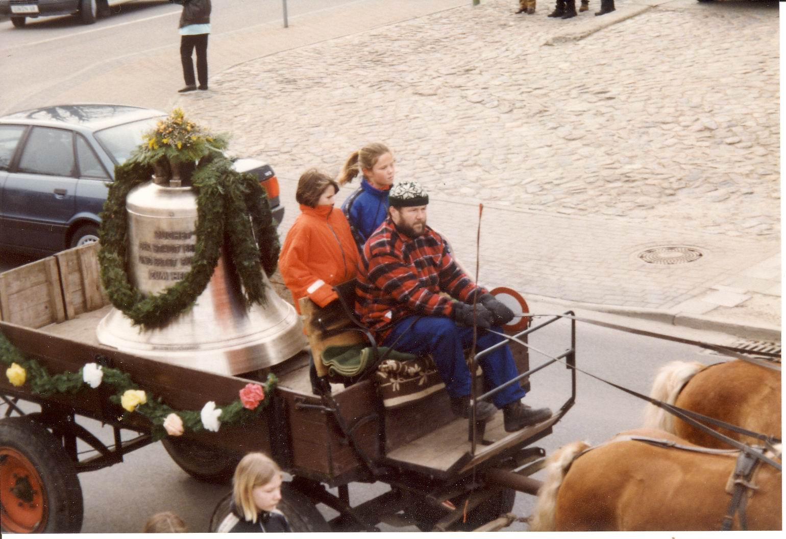 Rundfahrt der neuen Glocken durch die Stadt 2000